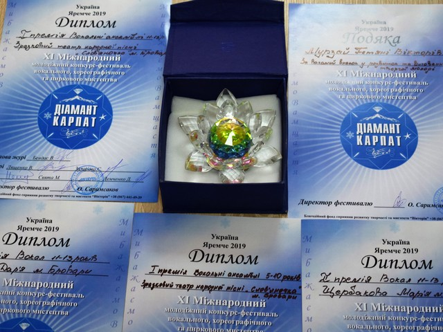 В